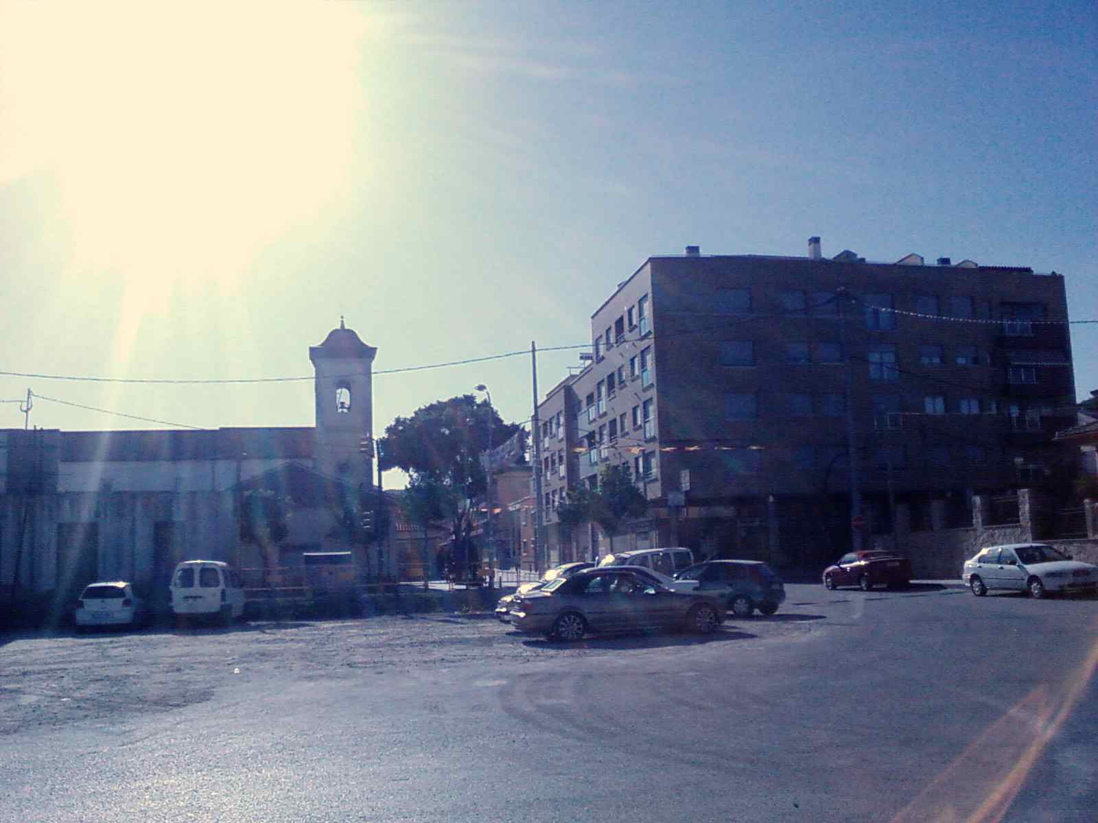 plaza de la iglesia de sangonera la verde